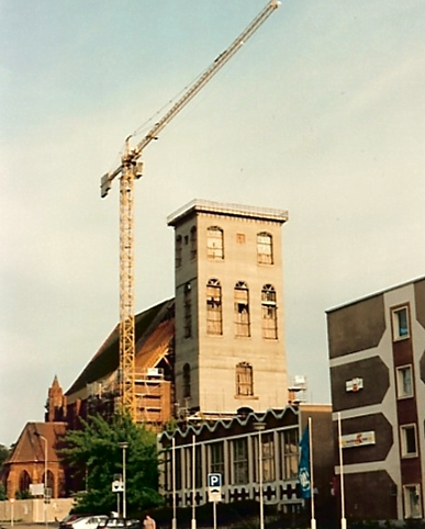 1992, nach Teileinsturz 1984 Wiederaufbau des Turmes mittels Betongleitkern (später verblendet)